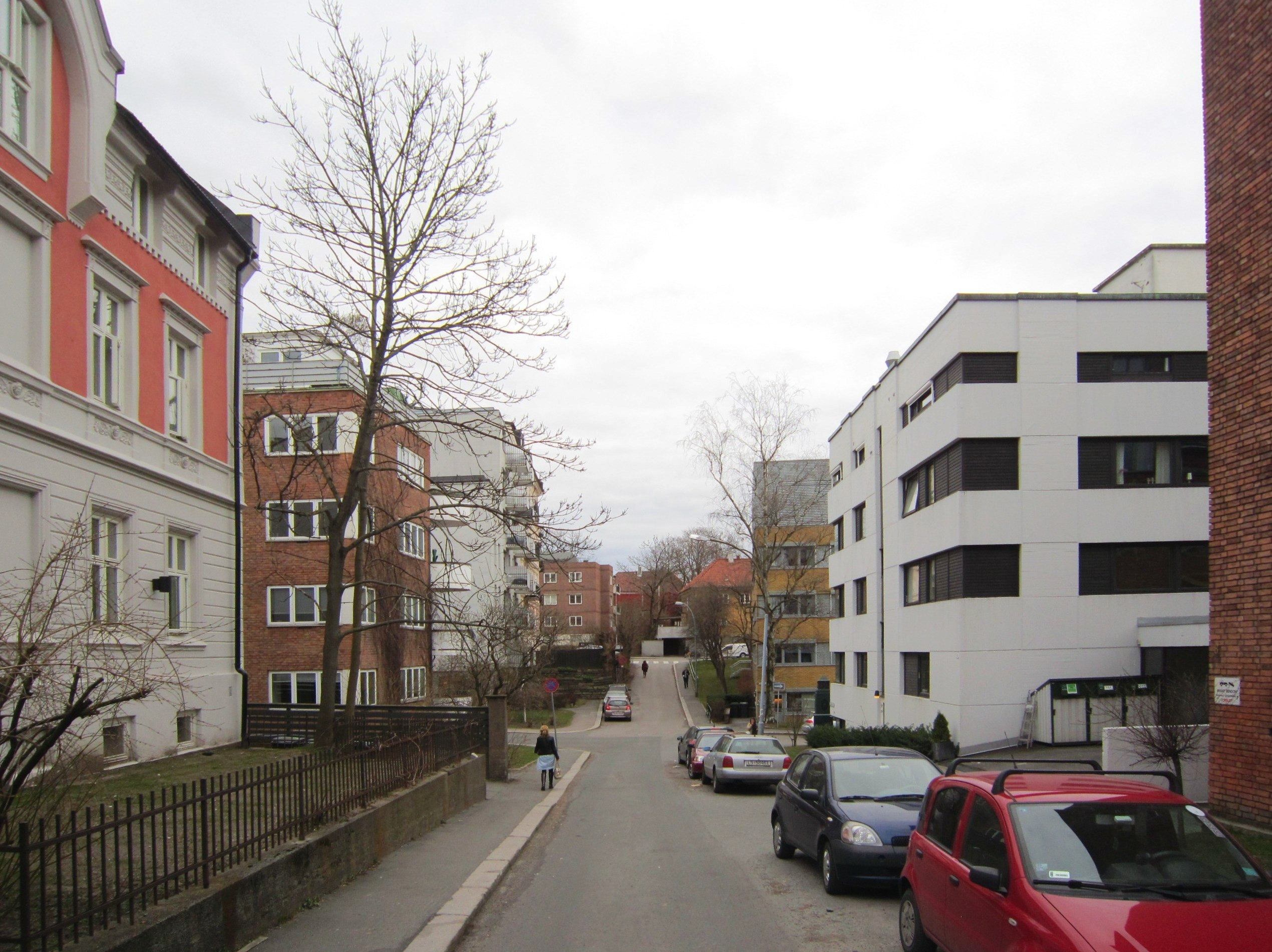 Ole Fladagers gate i Oslo